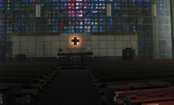 Epiphaniaskirche in Mannheim-Feudenheim